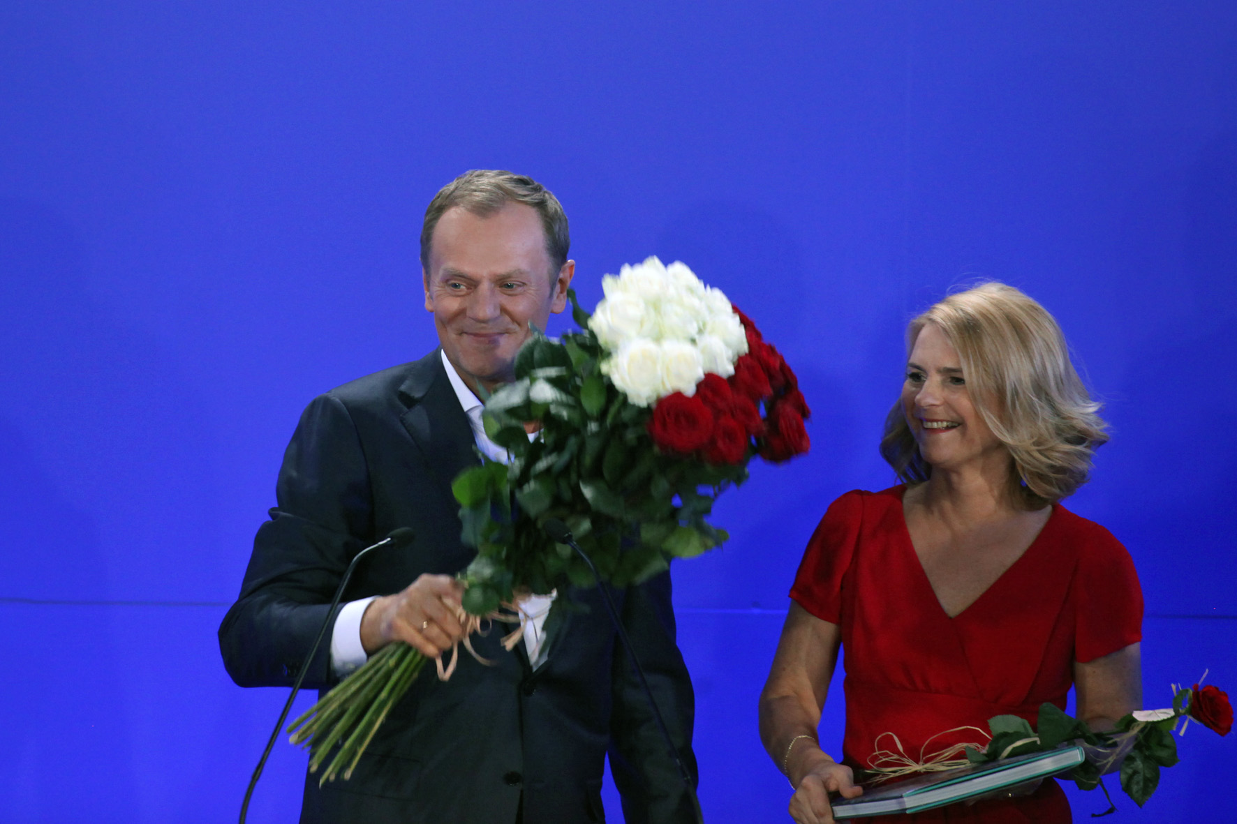 09.10.2011, Wieczór wyborczy w Centrum Biurowym Focus. Platforma Obywatelska zwyciężyła w wyborach parlamentarnych